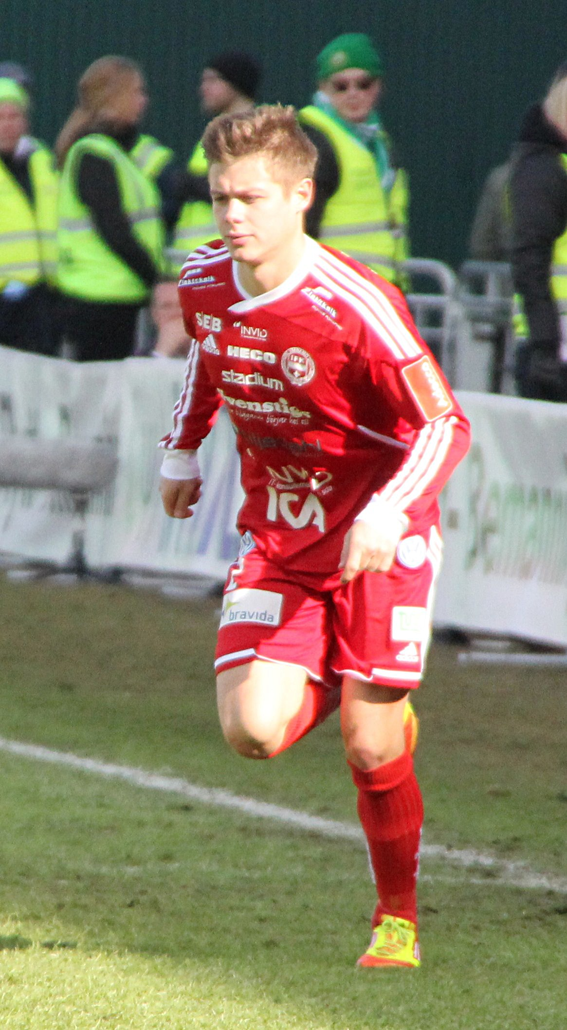 IFK Värnamos Erik Ferman.